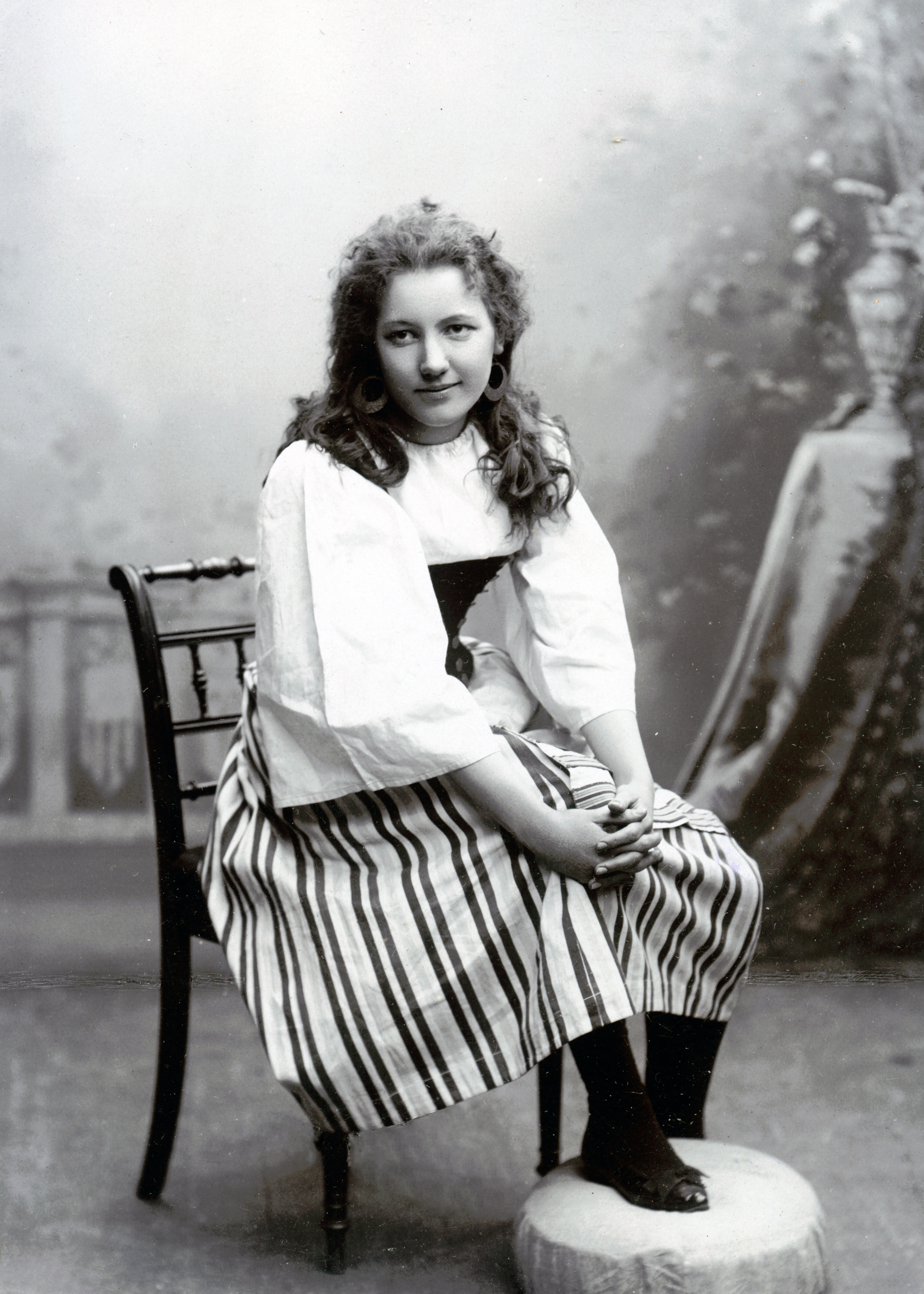 Götha Söderström, skådespelare vid Ranft-Hjertstedts sällskap 1895-96